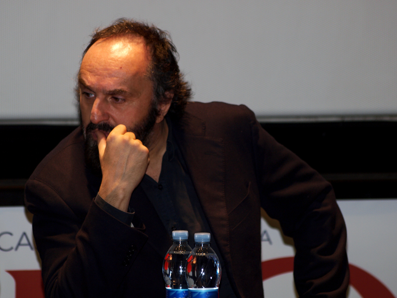 Andrea Buscemi - Foto di G. M. Ireneo Alessi (Sinix)